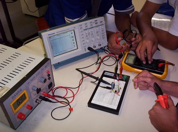 Teste de Circuito